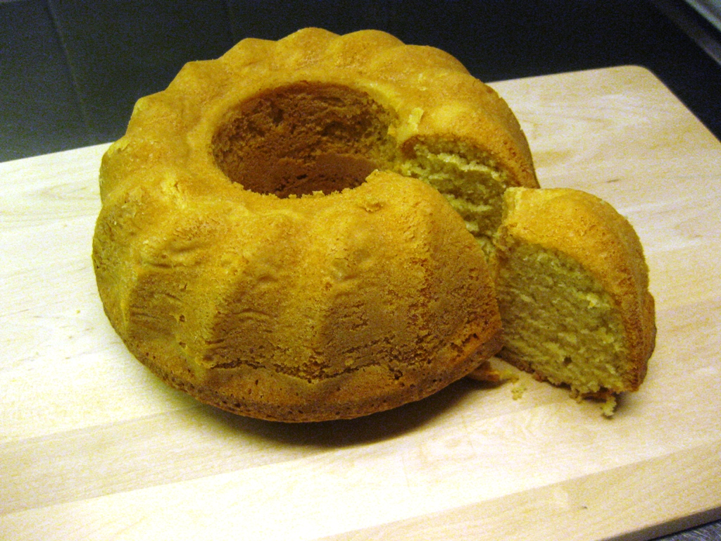 Sockerkaka